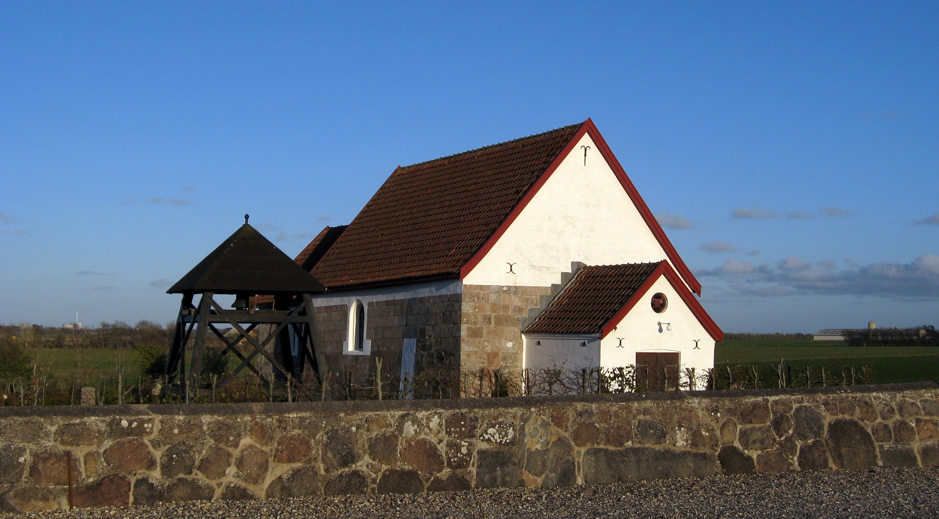 Vejby Kirke, Hjørring Kommune